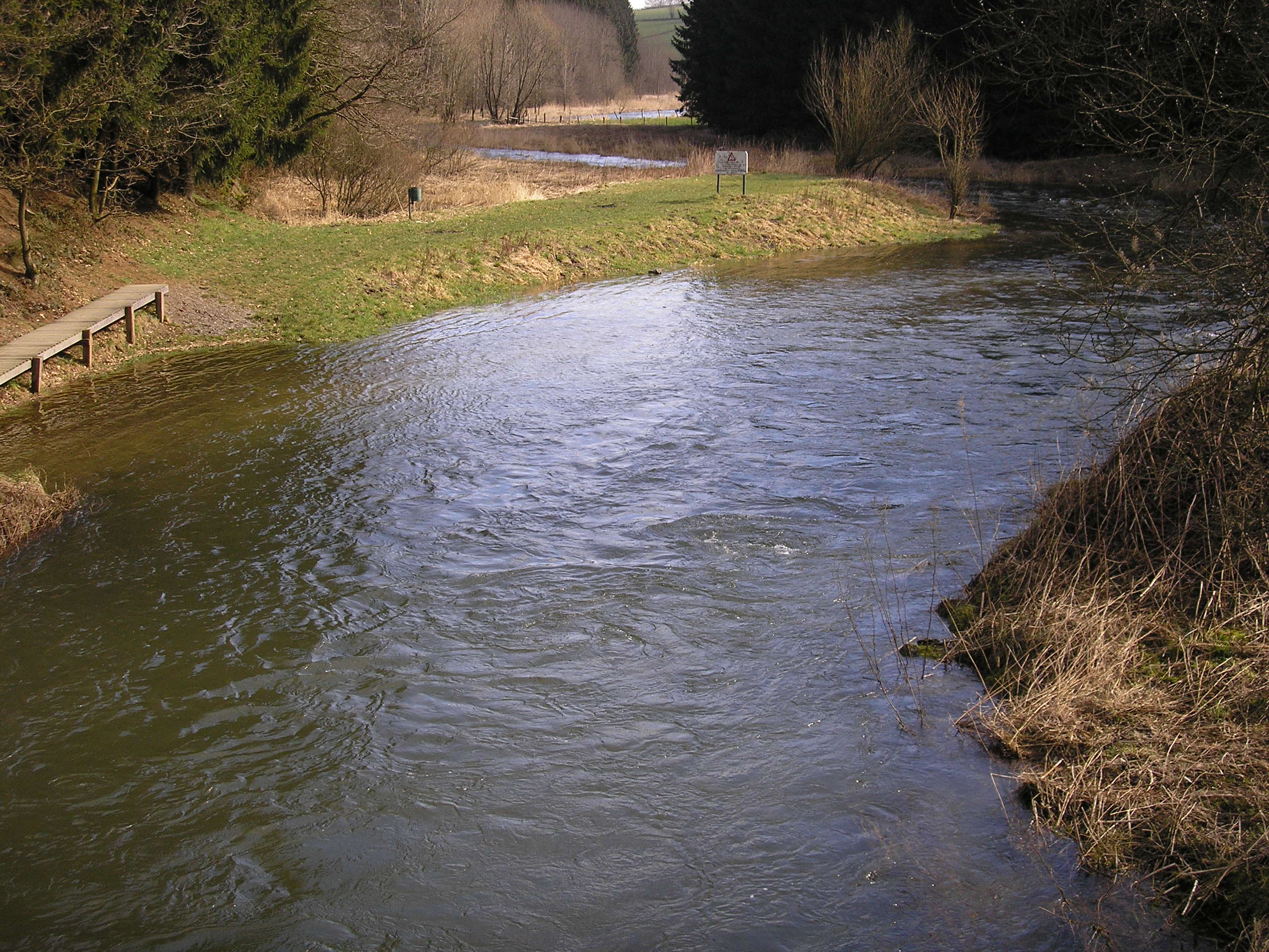 River Warche near Butgenbach, East Belgium, Warchetal bei Bütgenbach